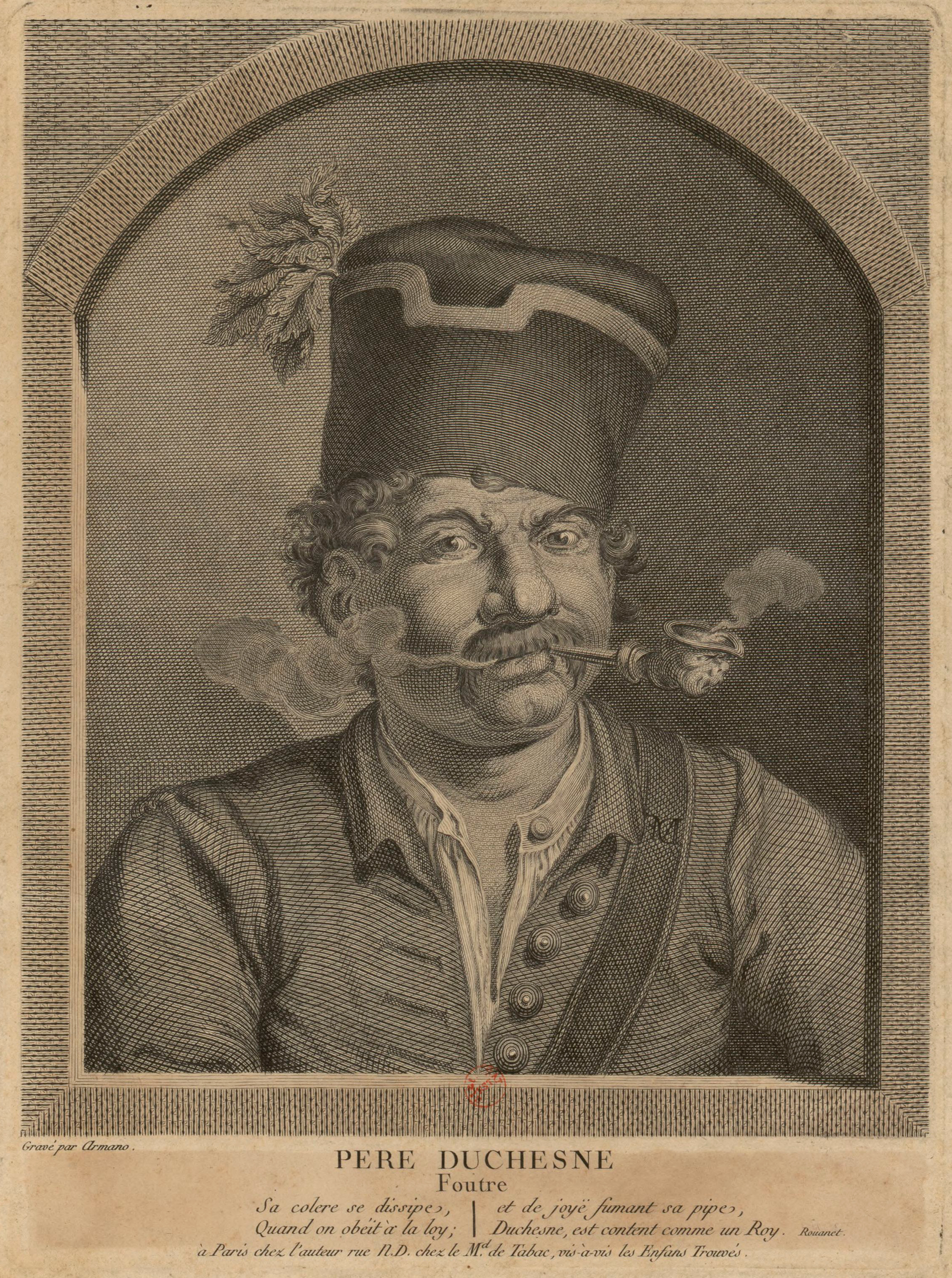 Estampe représentant le Père Duchesne. Gravure d'Armano, vers 1790-1794.